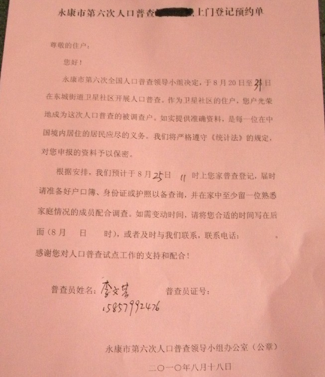 中国第六次人口普查浙江省永康市登记预约单